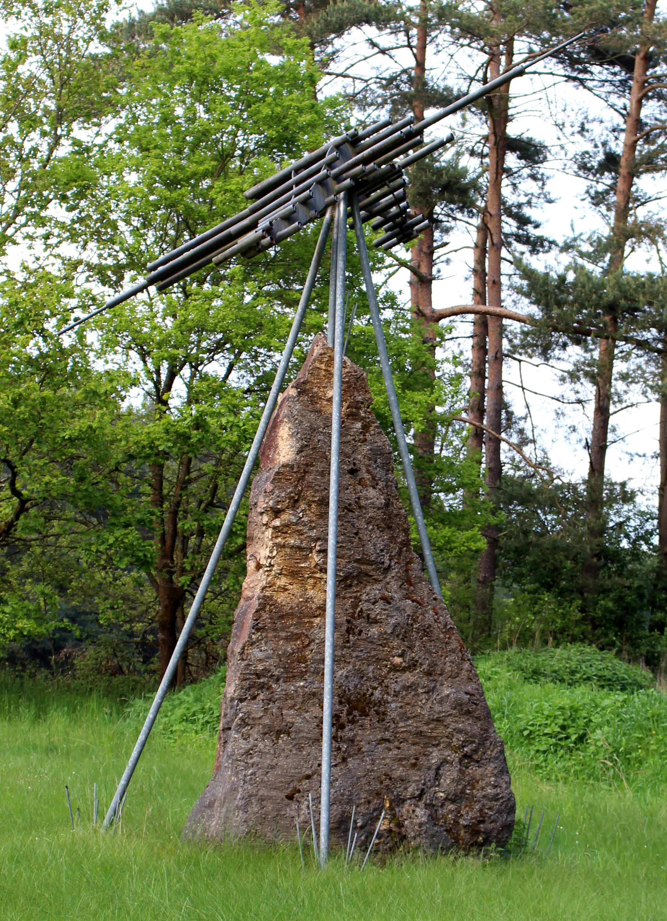 Siegenburg Range, Landkreis Kelheim, Niederbayern: Mahnmal